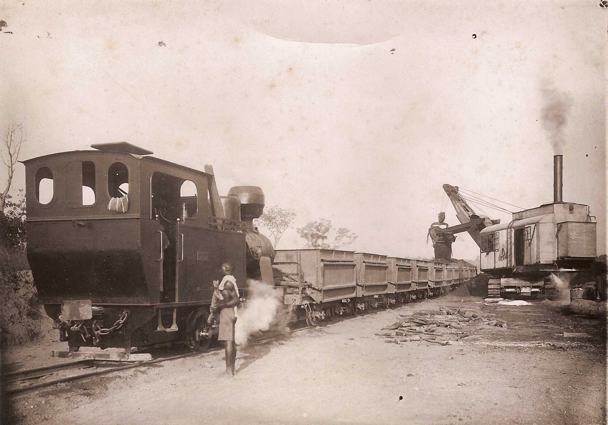 Travaux neufs du Savé Nige Chantier de terrassement P.K.373 20 déembre 1932